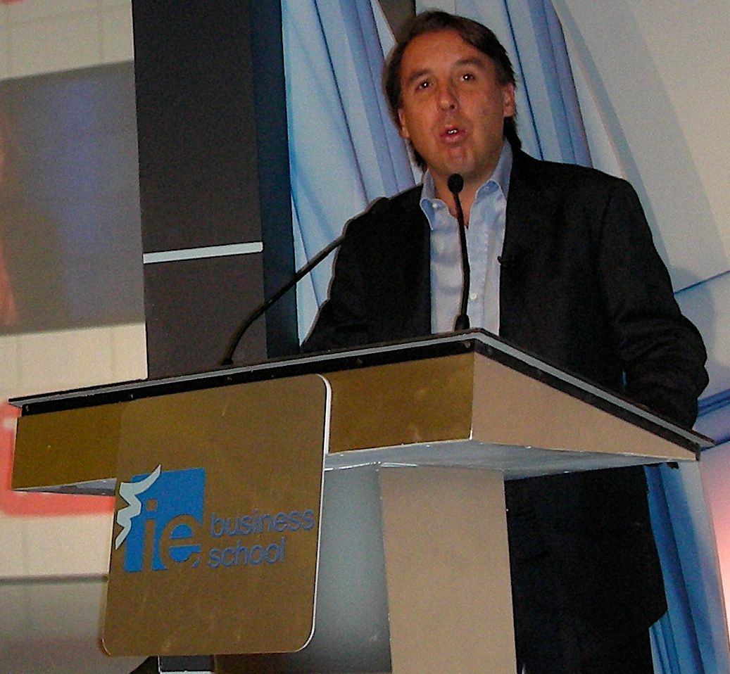 Emilio Azcárraga Jean, Presidente de Grupo Televisa